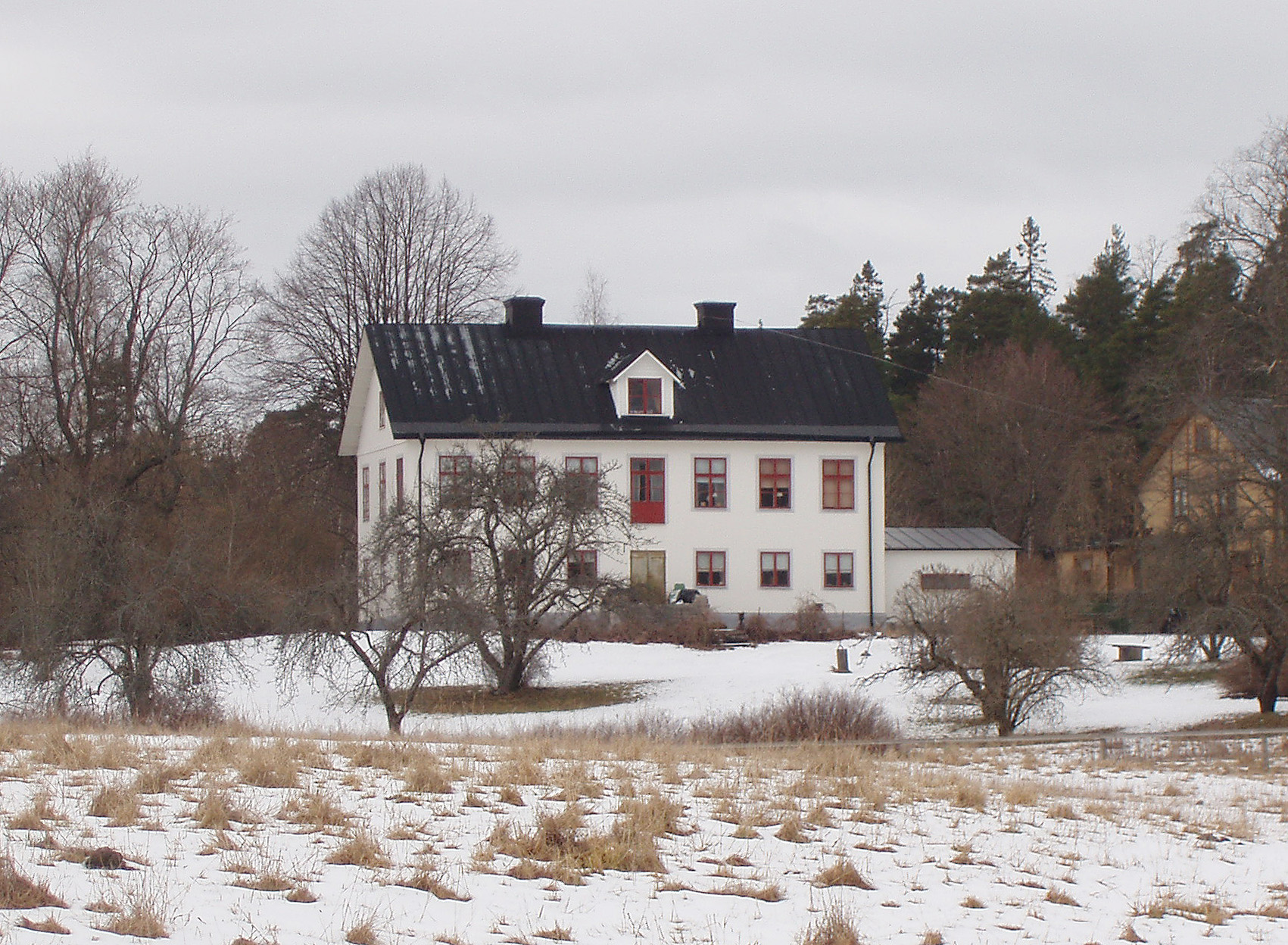 Östra Yttringe herrgård, Lidingö. Uppförd 1801. Östra sidan av gården.